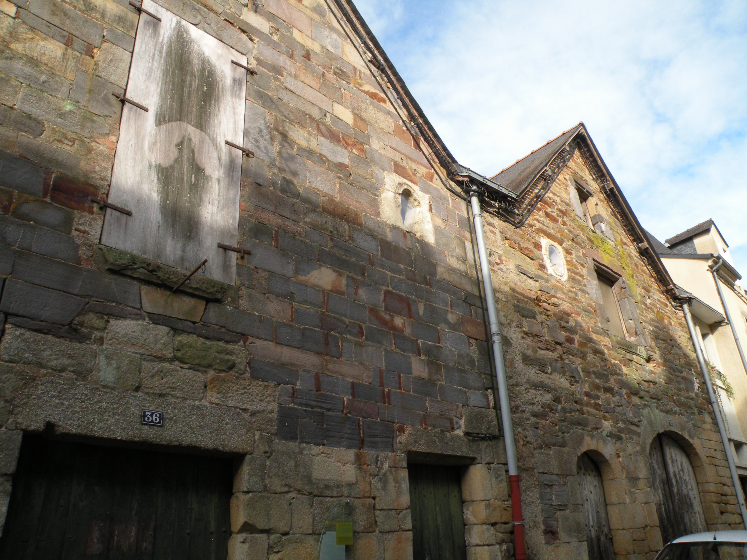 Anciens greniers à sel de Redon, rue du Port.